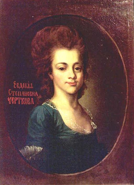 Авдотья Степановна Тевяшова (1769- ок.1827), жена Дмитрия Васильевича Черткова (1758-1831)